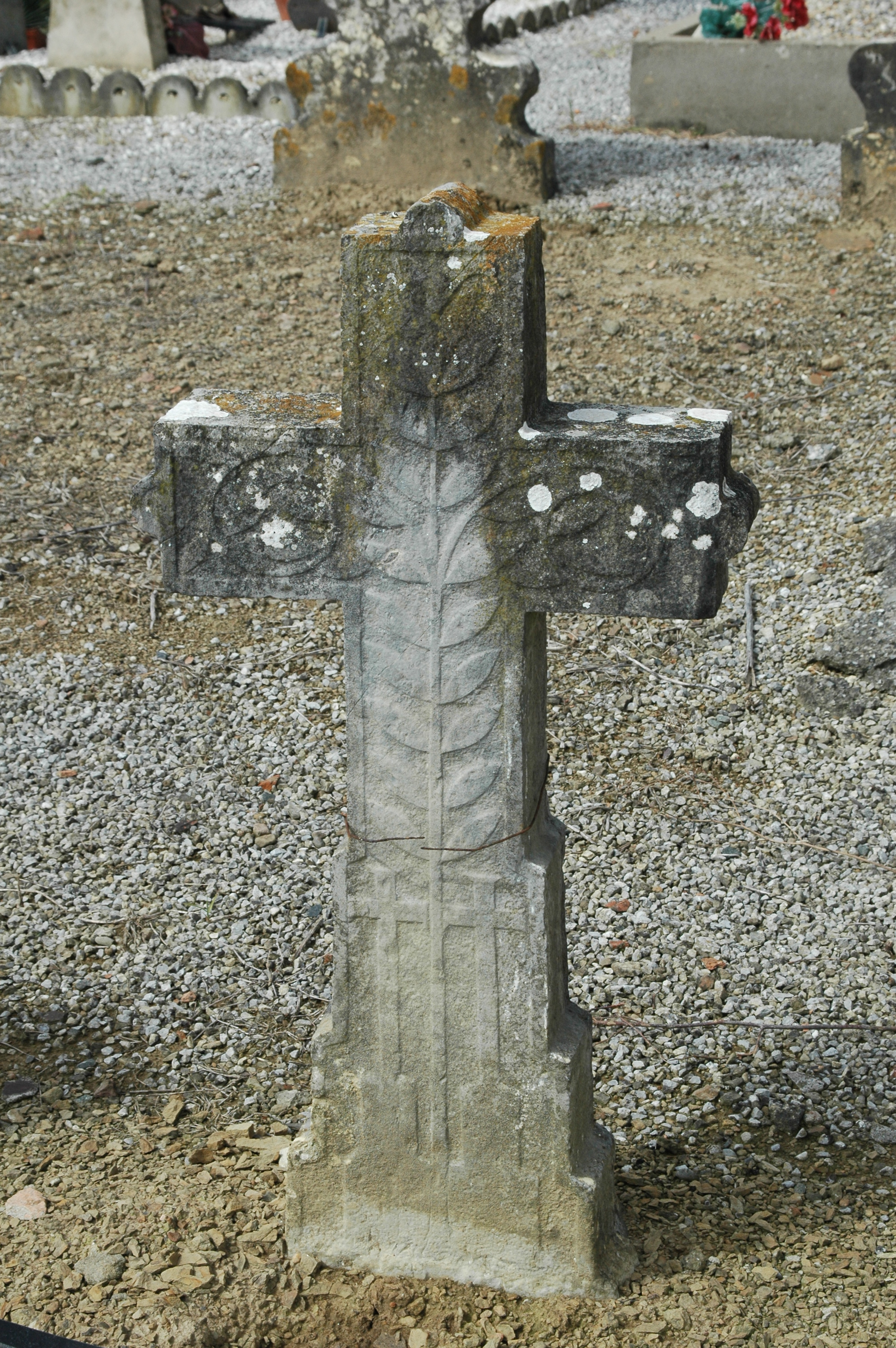 Stèle dans le cimetière de Succos